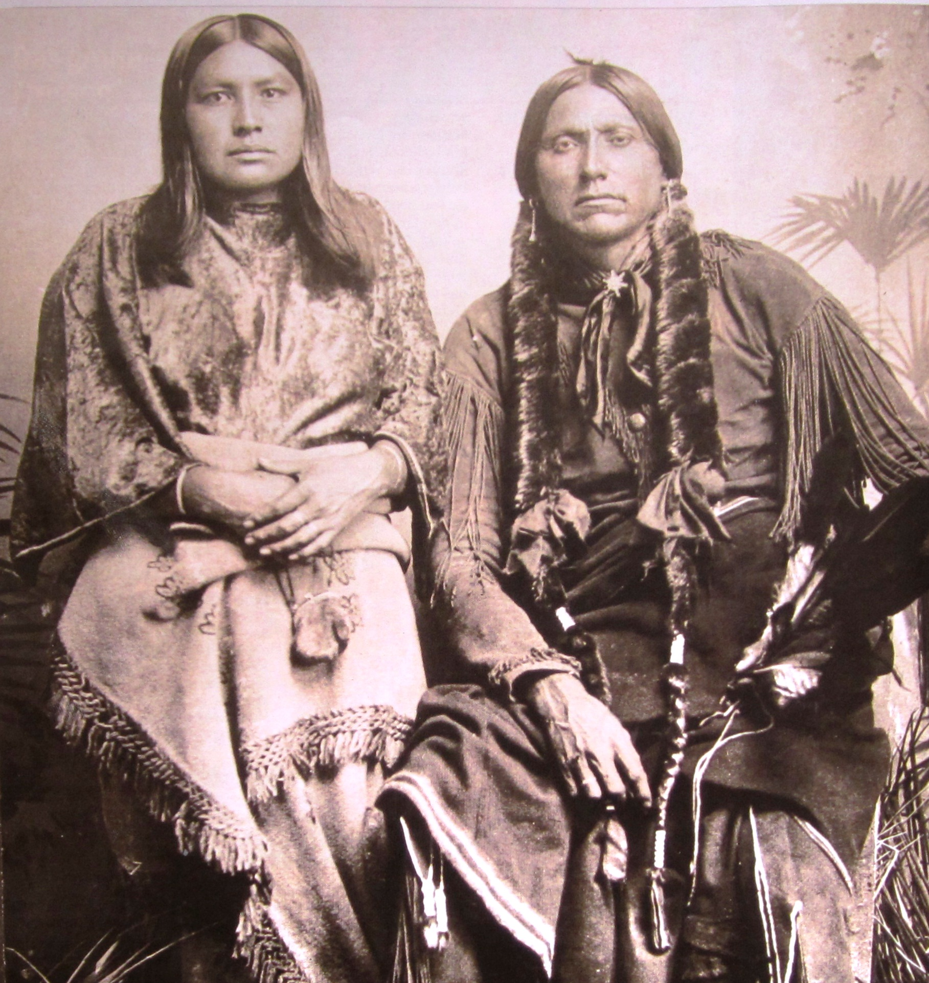 Quanah Parker († 1911) an his wife